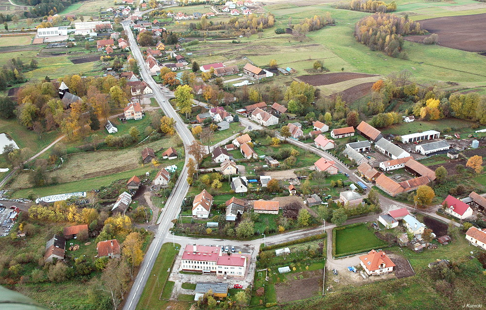 Wieliczki